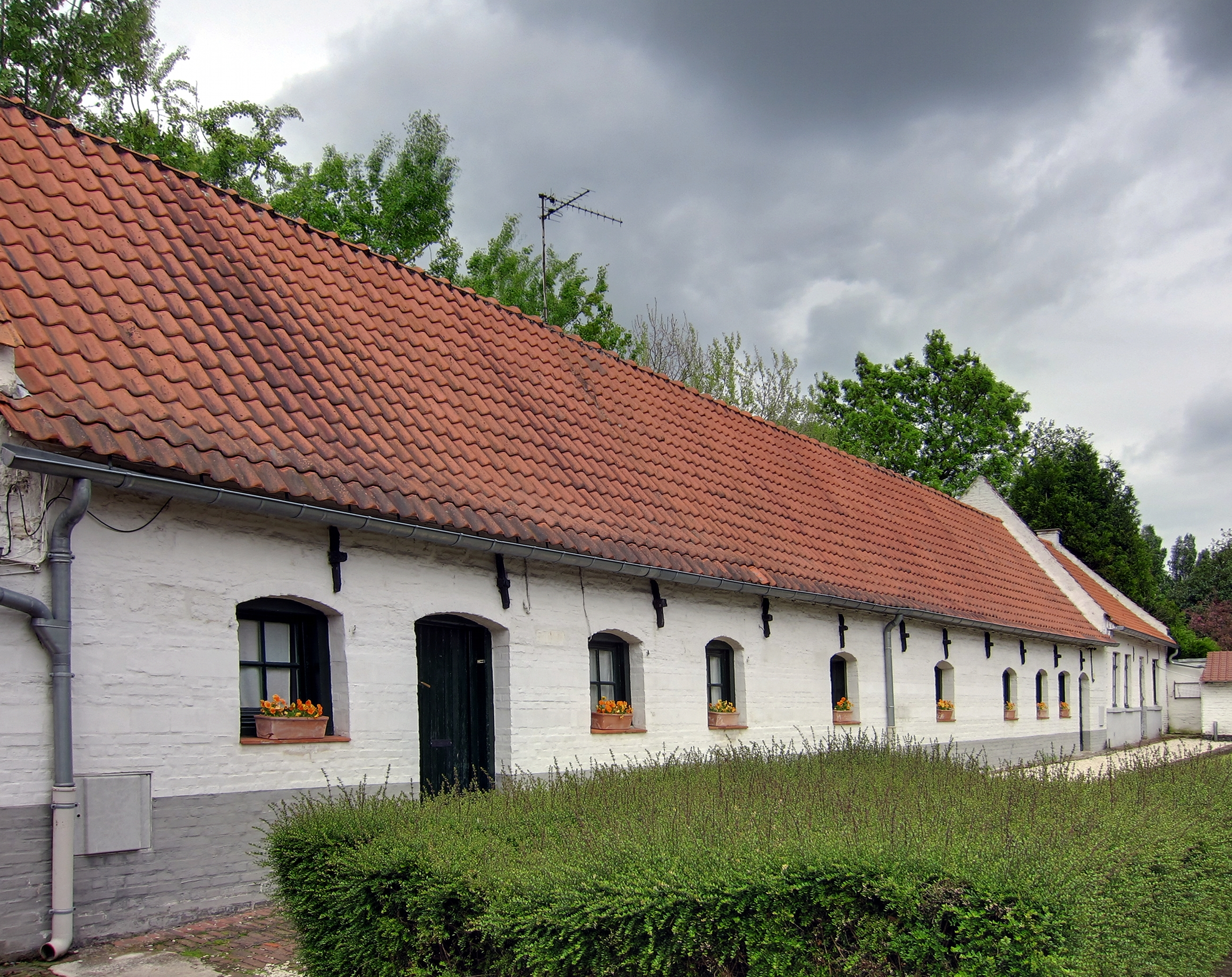 Les maisons d'Hempempont, 14 rue de Croix, à Hem (Nord).